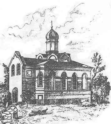 Кладбищенская церковь во имя всех святых